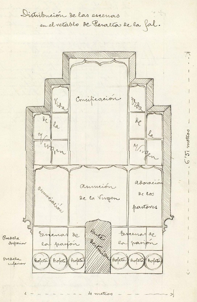 Esquema del desaparegut retaule de Peralta de la Sal, obra de Pere Garcia de Benavarri i Jaume Ferrer II